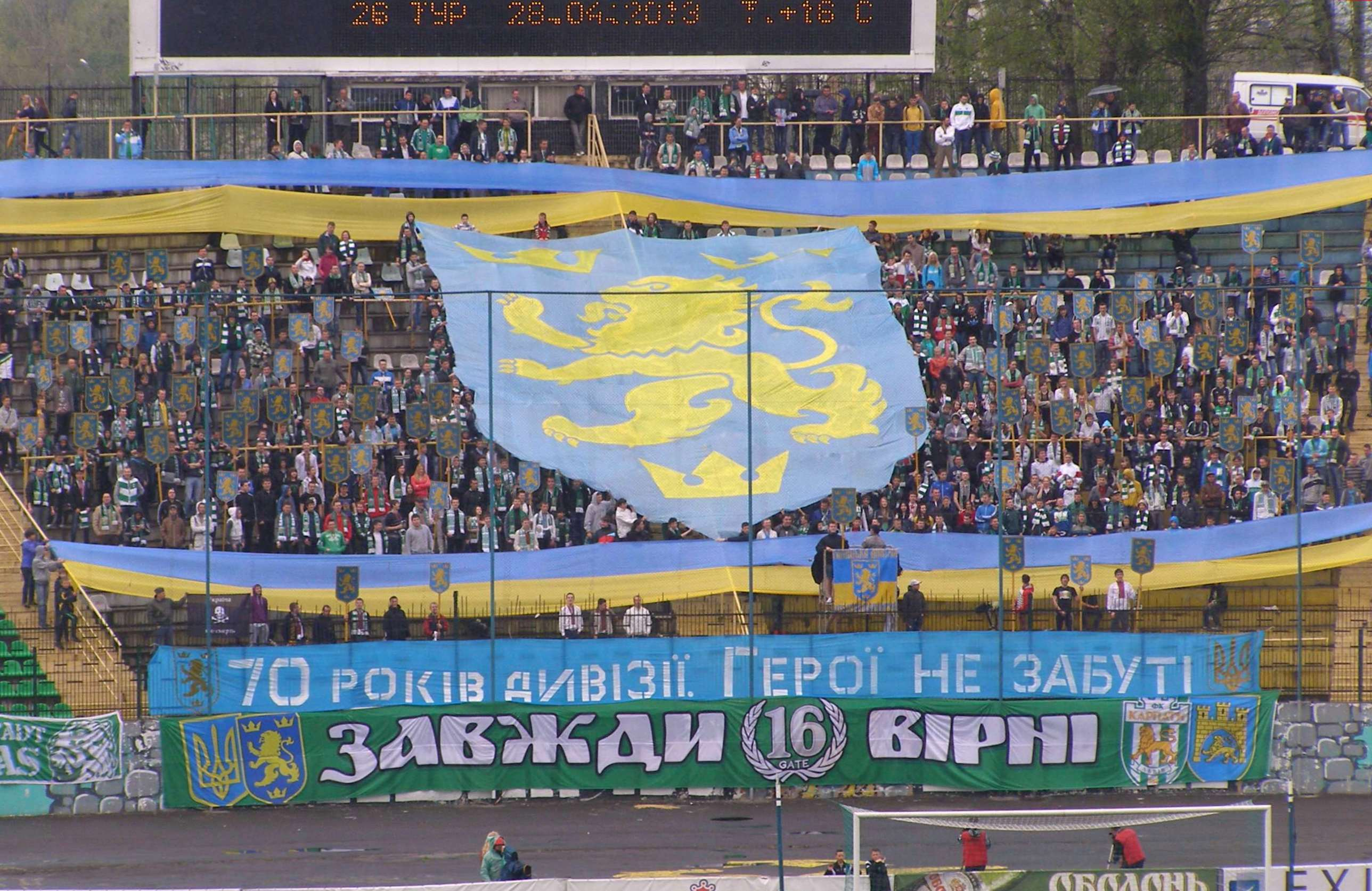 SS-Galizien-Banner beim Spiel Karpaty gegen Sorja. Lwiw. Auf dem Banner steht : 70 Jahre Division, Helden nicht vergessen